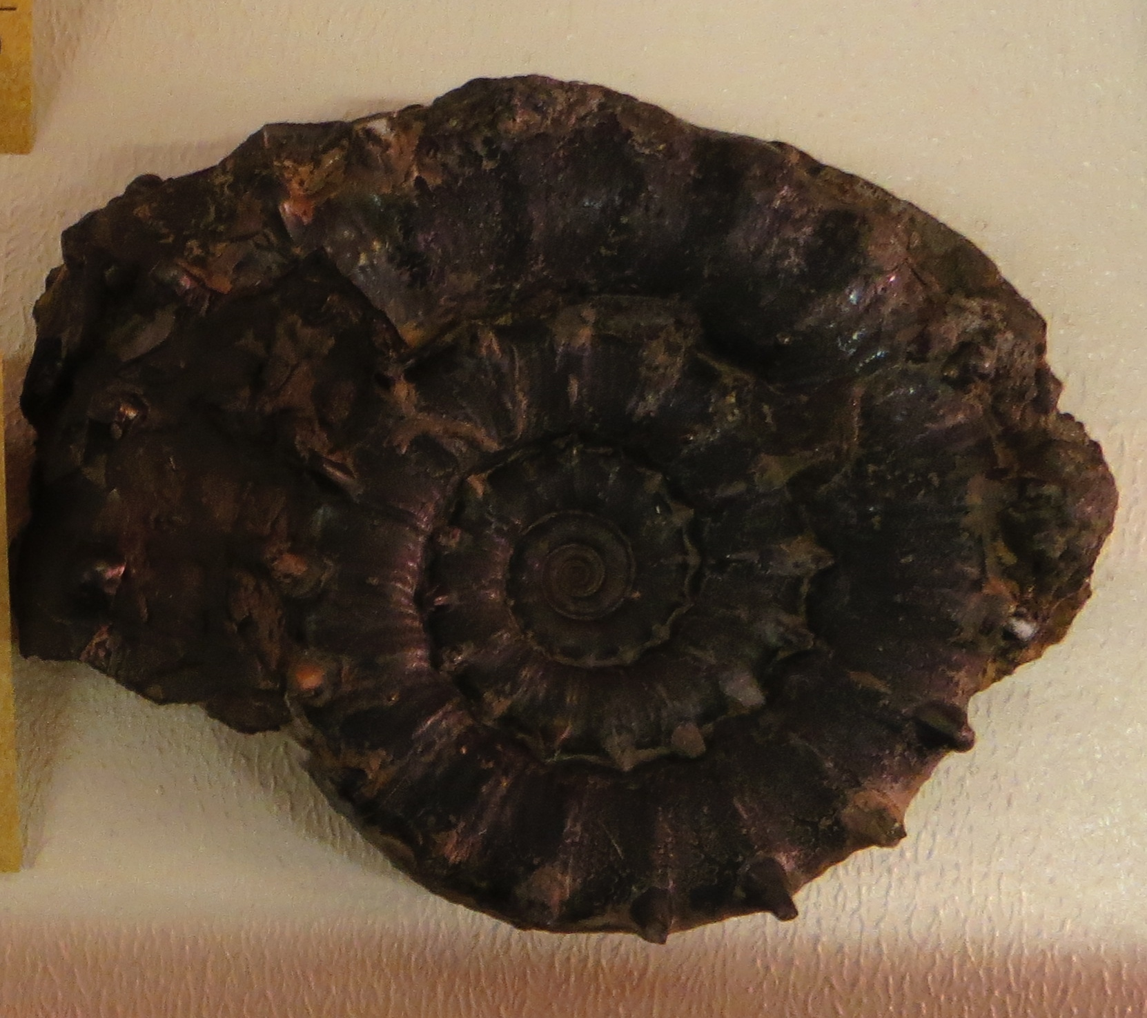 Took the picture at Burgmeister Muller Museum, Solnhofen